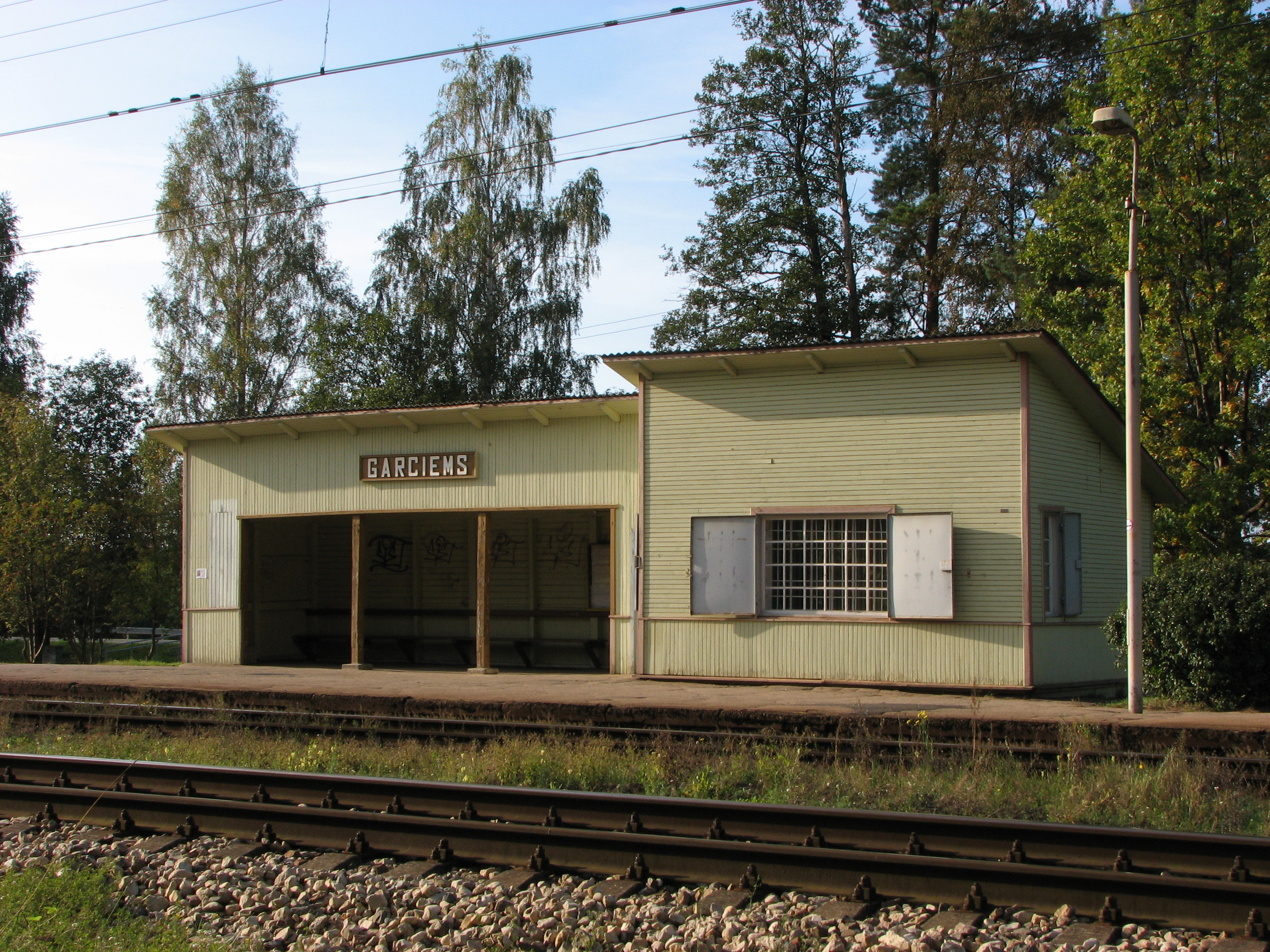 Пассажирский павильон о. п. Гарциемс, Латвия.